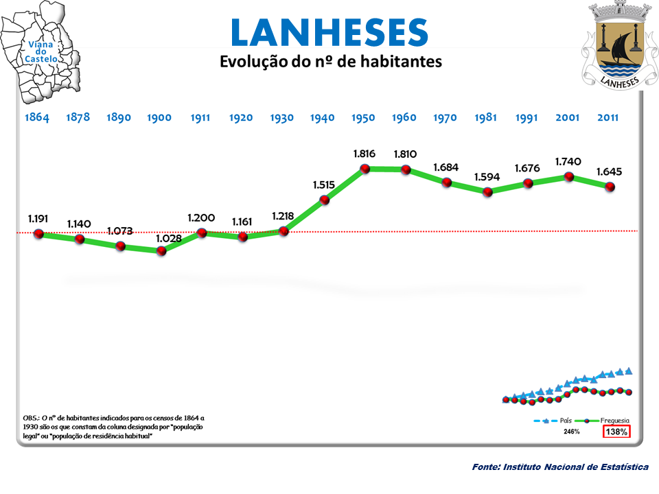 Censos 1864/2011